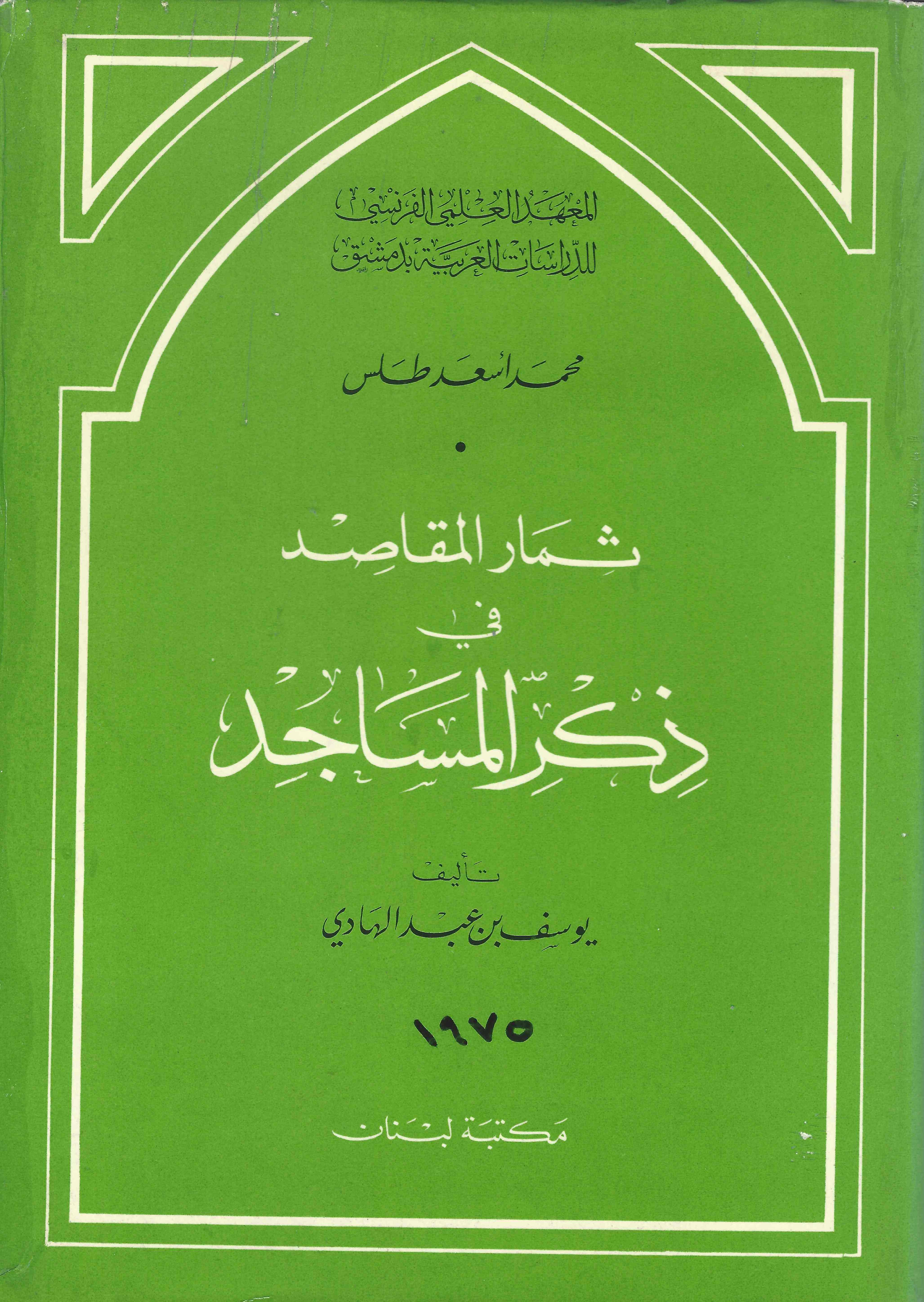 غلاف كتاب (ثمار المقاصد في ذكر المساجد) من تحقيق الدكتور محمد أسعد طلس - مكتبة لبنان - الطبعة الثانية 1975.